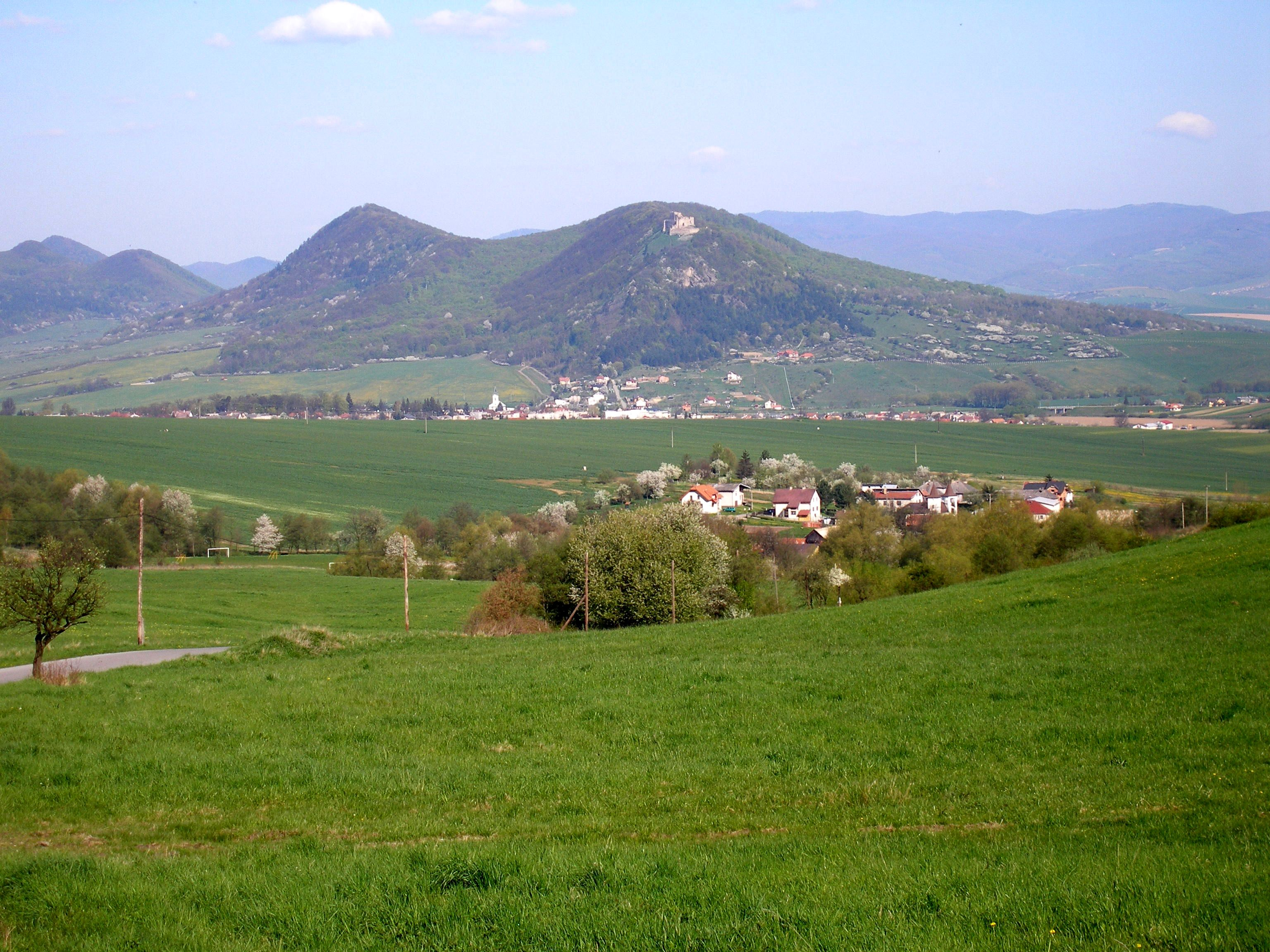 Obec Kapušany okres Prešov región Šariš